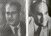 تصنيف:صور ملكية عامة - مصر